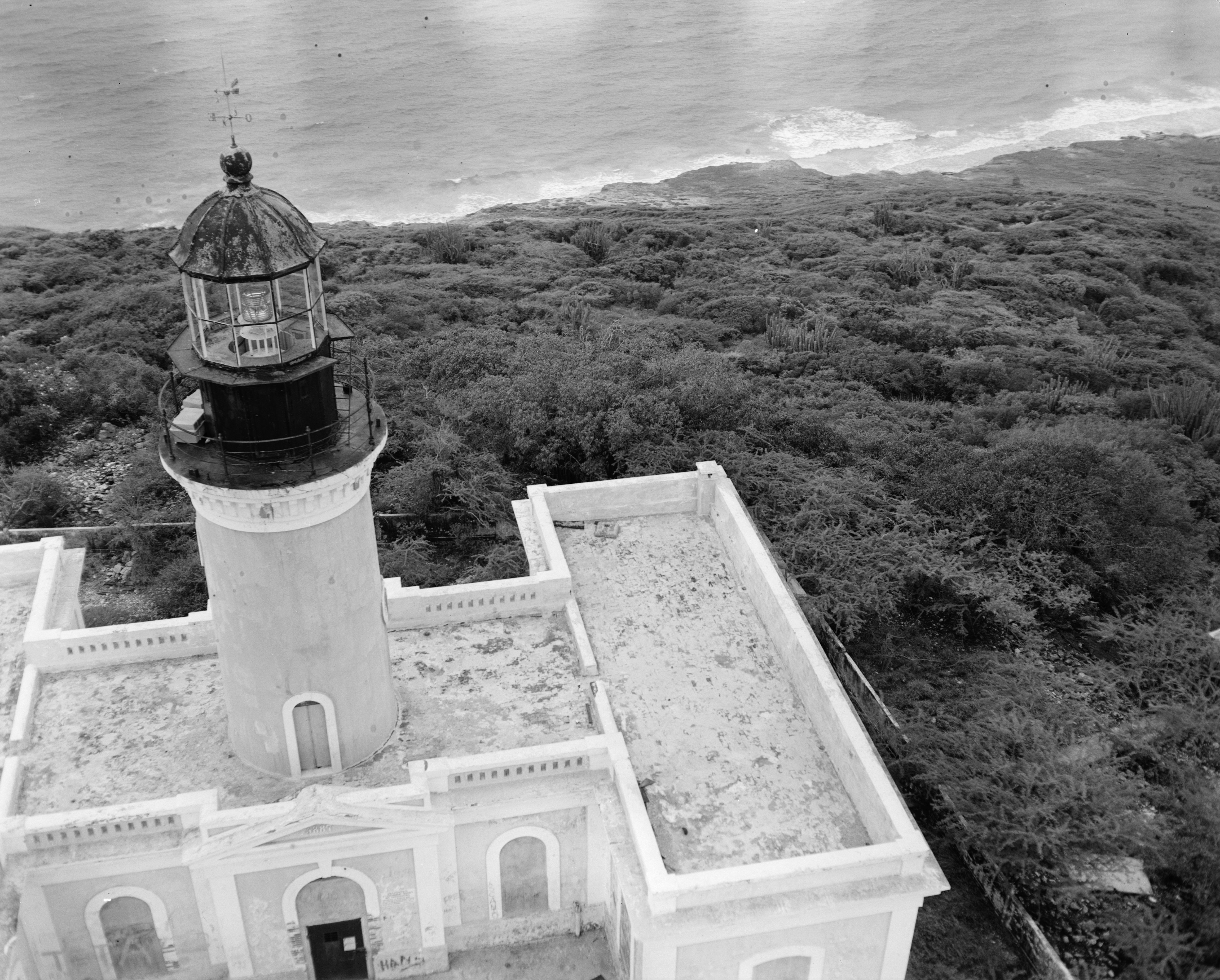 Caja de Muertos Lighthouse, Ponce, Puerto Rico